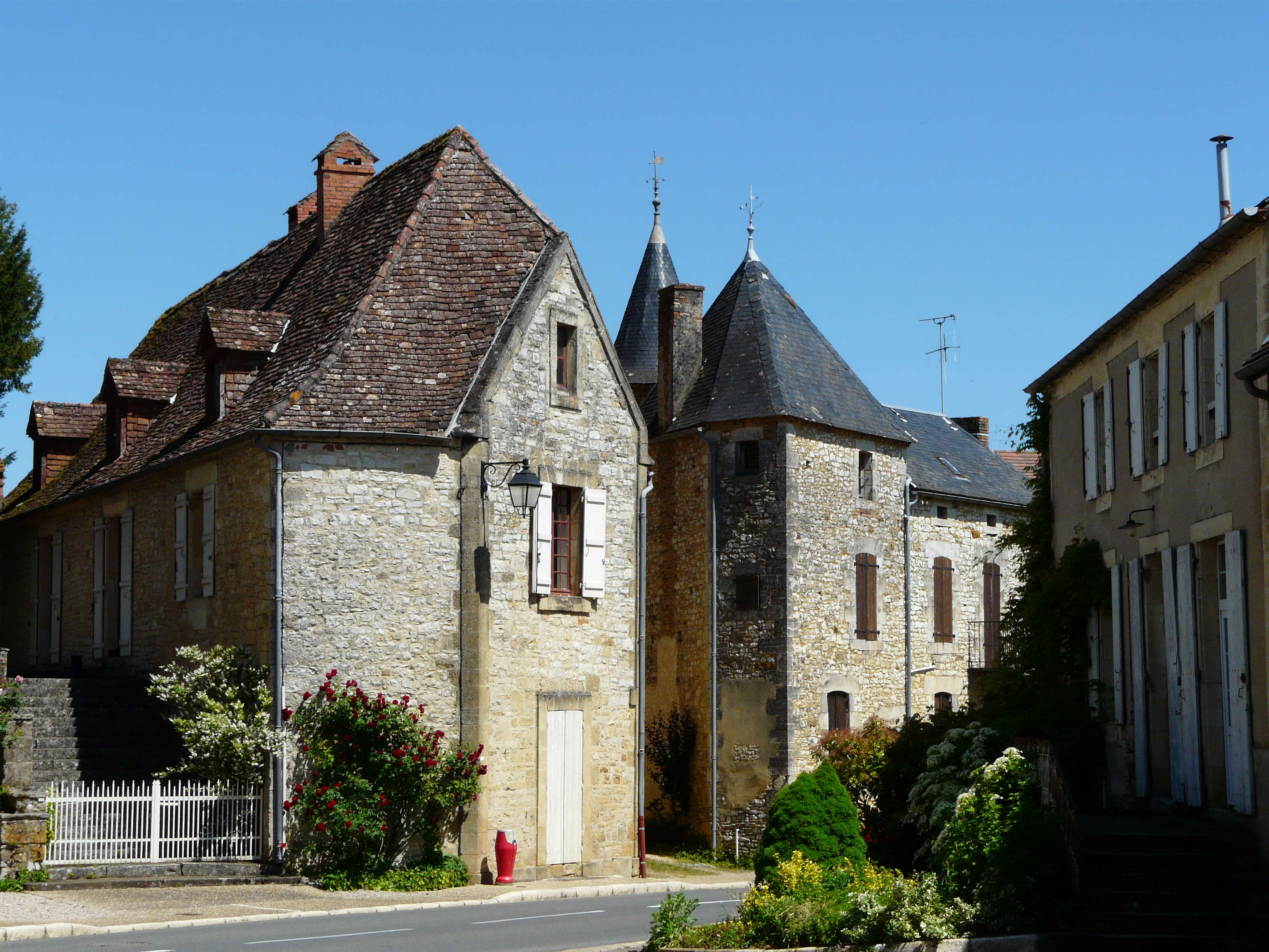 Maisons dans le village de Saint-Martial-de-Nabirat, Dordogne, France.